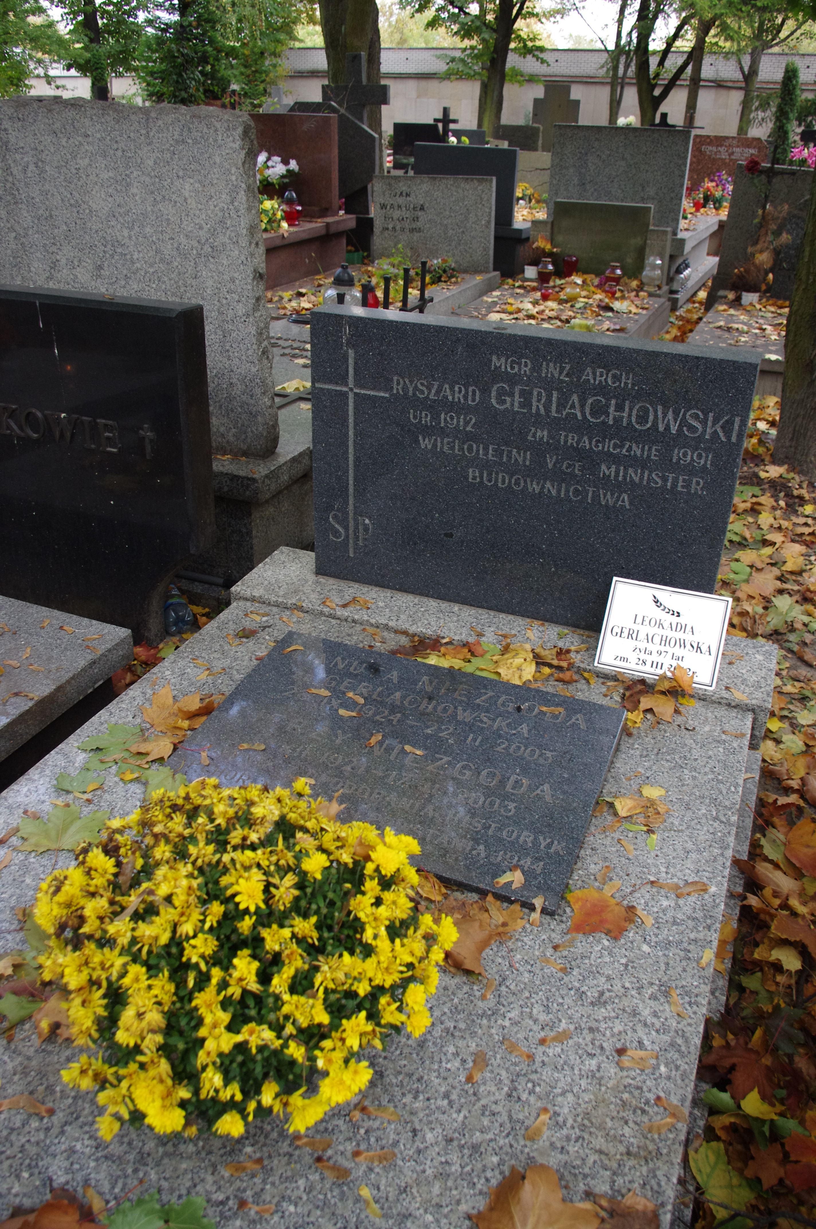 Grób wiceministra budownictwa Ryszarda Gerlachowskiego na Cmentarzu Wojskowym na Powązkach w Warszawie